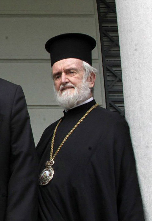 Ο Αντιπρόεδρος της Κυβέρνησης και Υπουργός Εξωτερικών, Ευάγγελος Βενιζέλος, είχε συνάντηση, την Τρίτη 17 Ιουνίου 2014, στο Υπουργείο Εξωτερικών, με την Α.Θ.Π. τον Οικουμενικό Πατριάρχη κ.κ. Βαρθολομαίο. Πηγή: ΕΥΡΩΚΙΝΗΣΗ